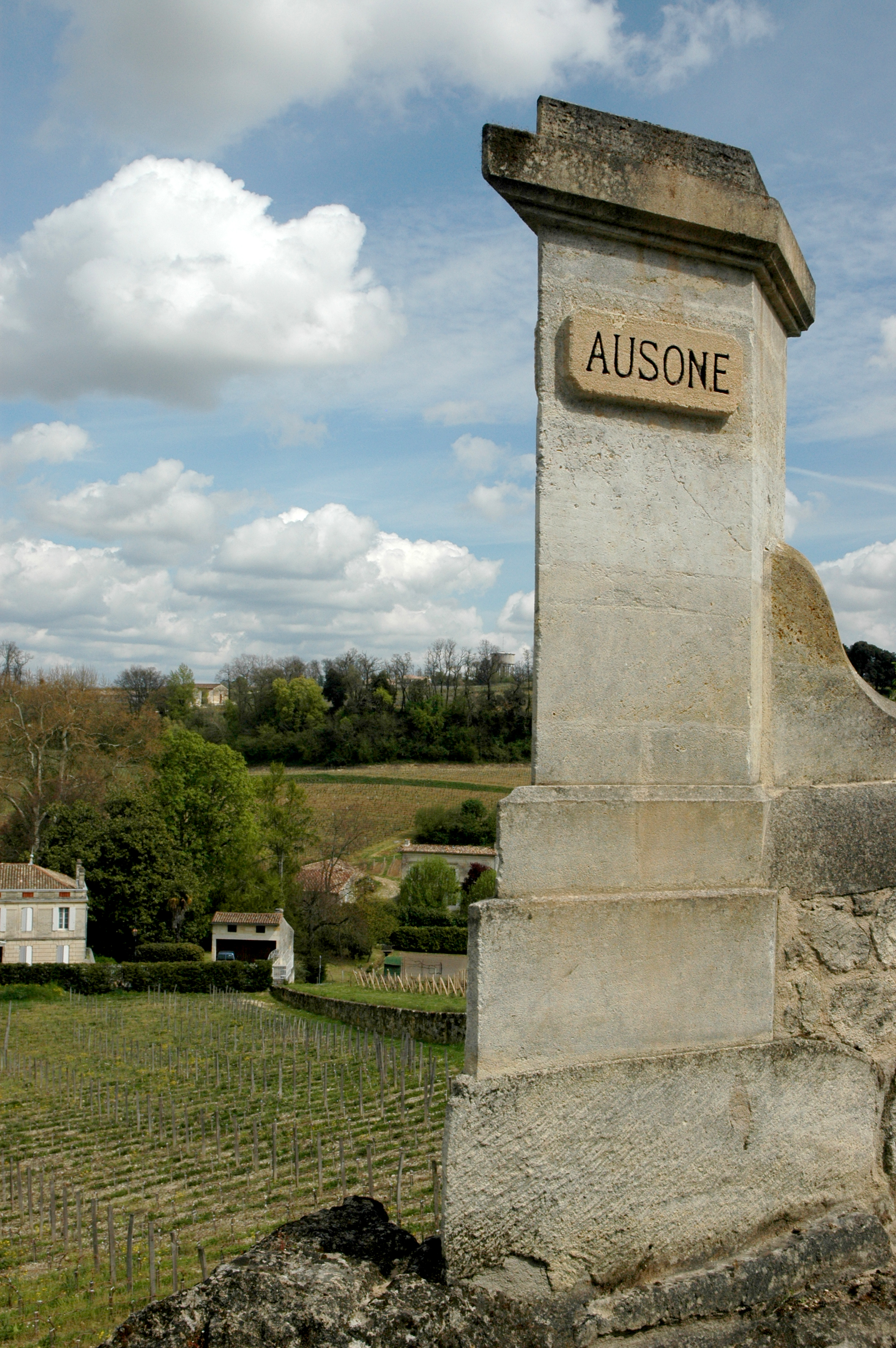 Château d'Ausone en avril 2006